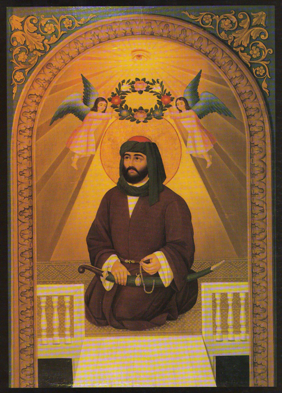 این اثر هنری بخاطر به این دلیل که اولین انتشارش قبل از ۱ ژانویهٔ ۱۹۲۳ روی داده است هم‌اکنون در سراسر جهان در مالکیت عمومی قرار دارد و استفاده از آن آزاد است. بنابراین تکثیر آن در ایالات متحده آمریکا، آلمان و بسیاری کشورهای دیگر آزاد است.